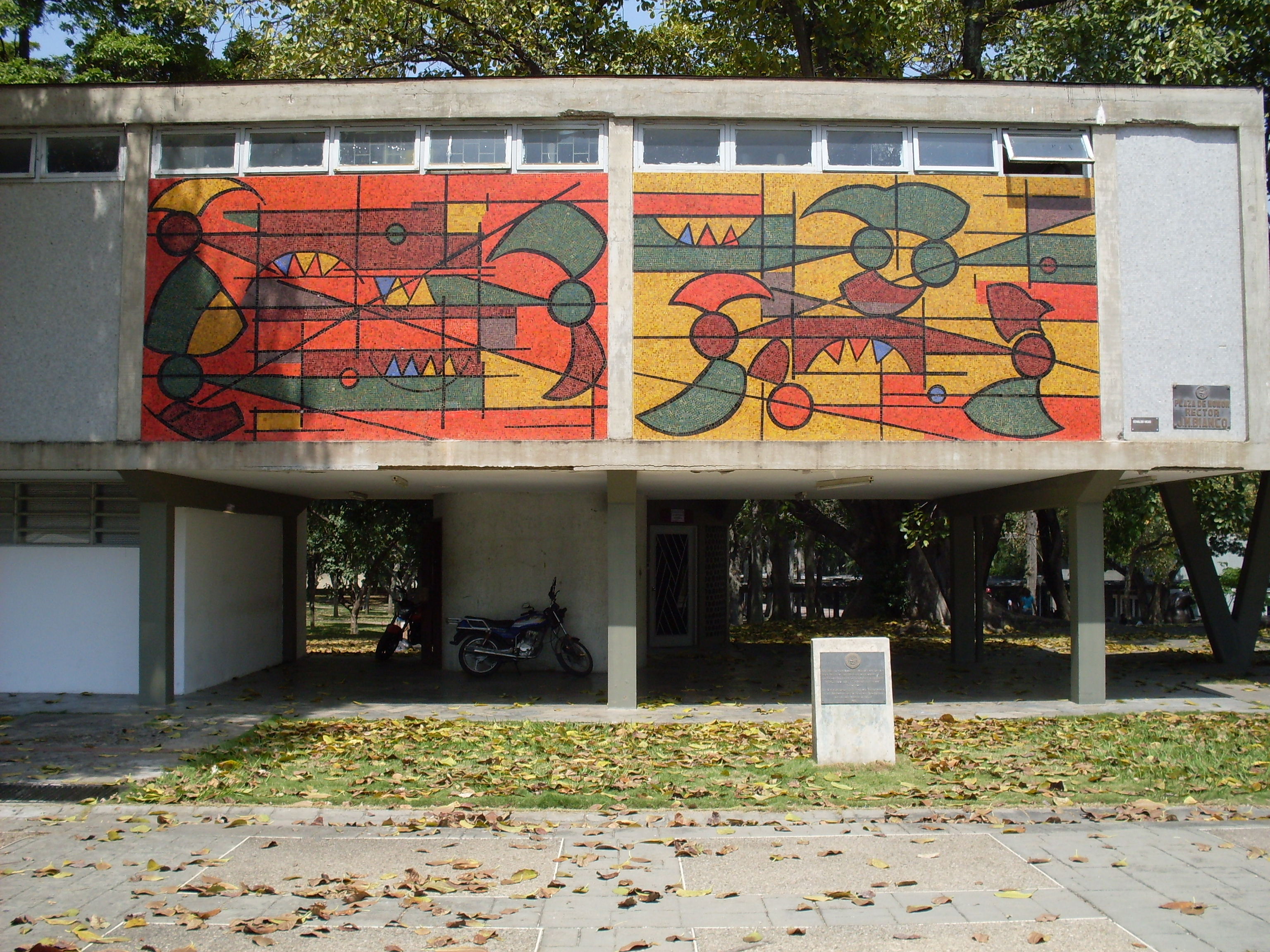 Mural de Oswaldo Vigas. Título: Composición estática. Composición dinámica. Autor: Oswaldo Vigas. Año: 1954. Ubicación: Universidad Central de Venezuela, Plaza del Rectorado.